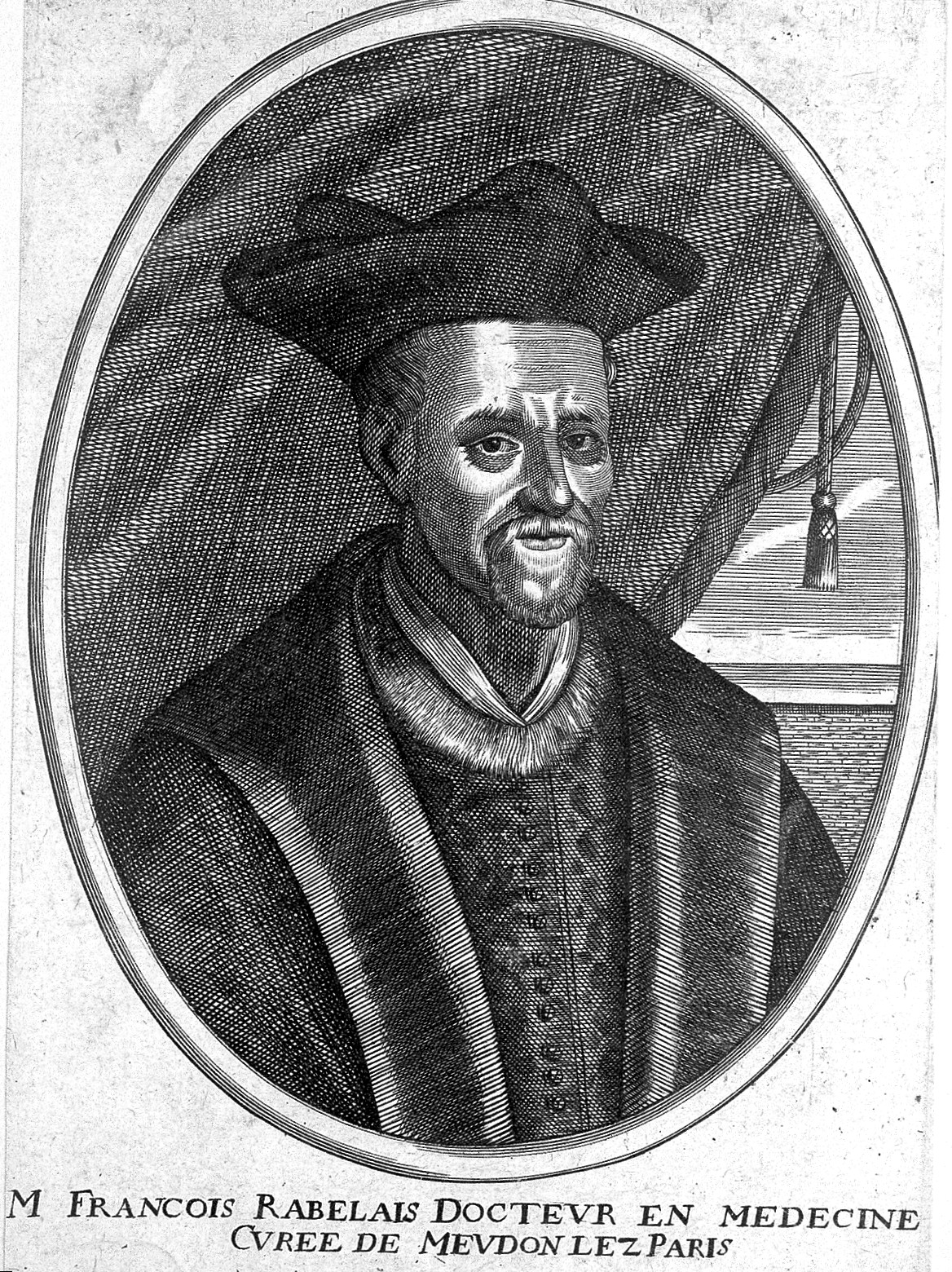 François Rabelais. Line engraving. Iconographic Collections Keywords: François Rabelais